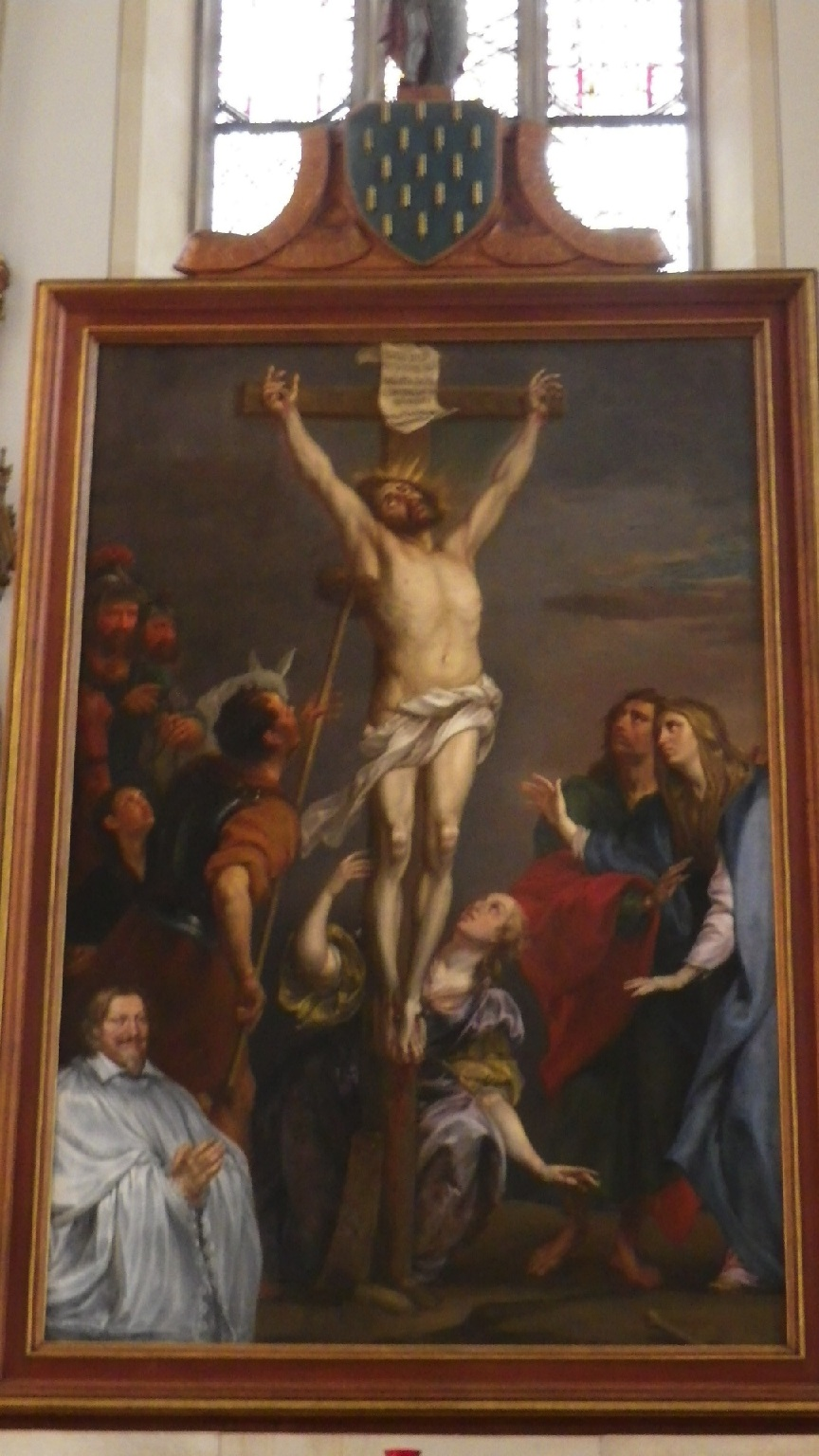 Altargemälde in St. Mauritz (Münster)